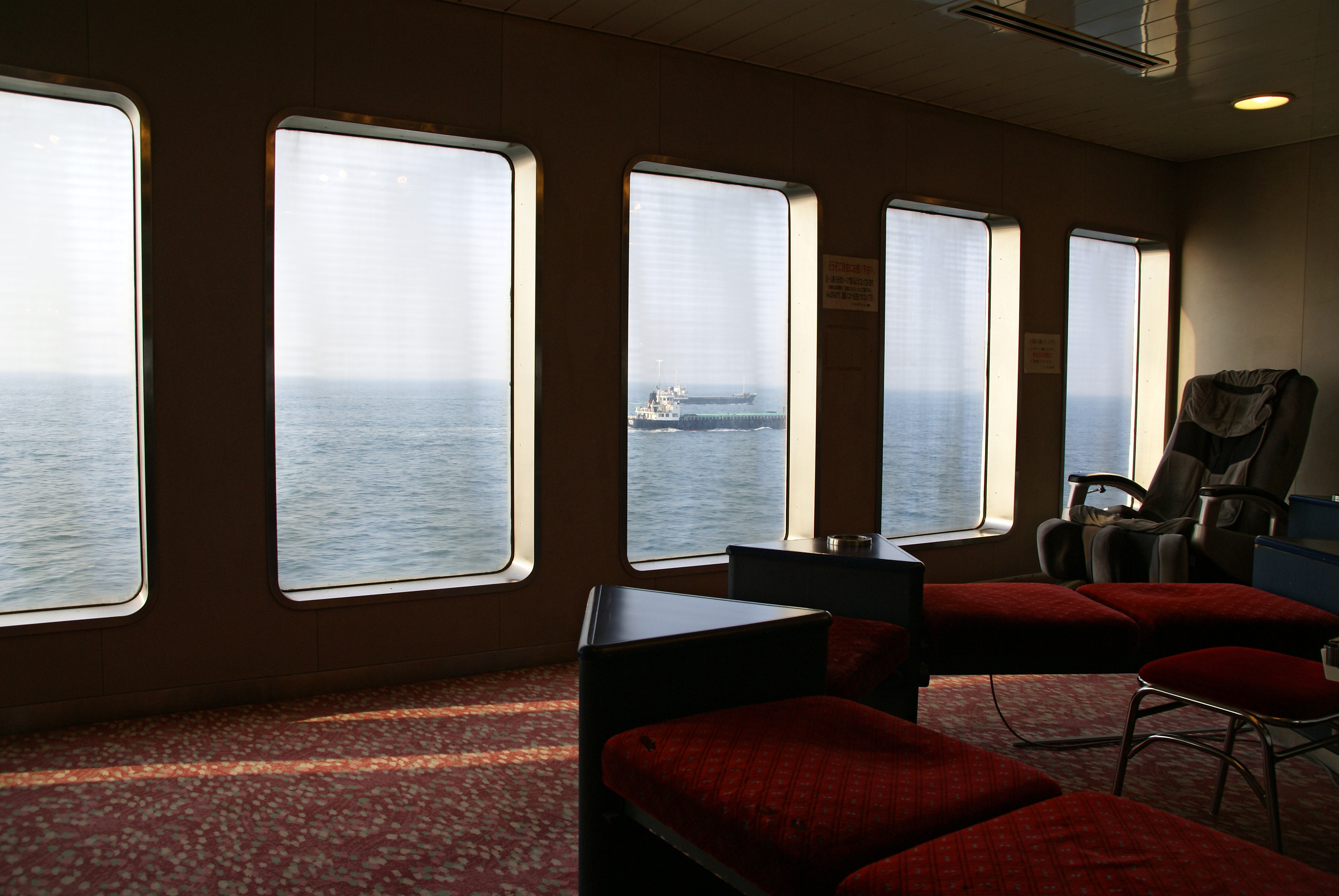 Ferry "Konpira2"